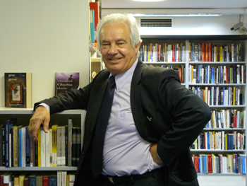 Milivoj Pašiček knjige